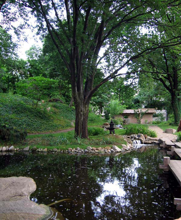 Description:Botanicka basta Jevremovac u Beogradu- japanski vrt author: Snezana Trifunovic Source: self-made